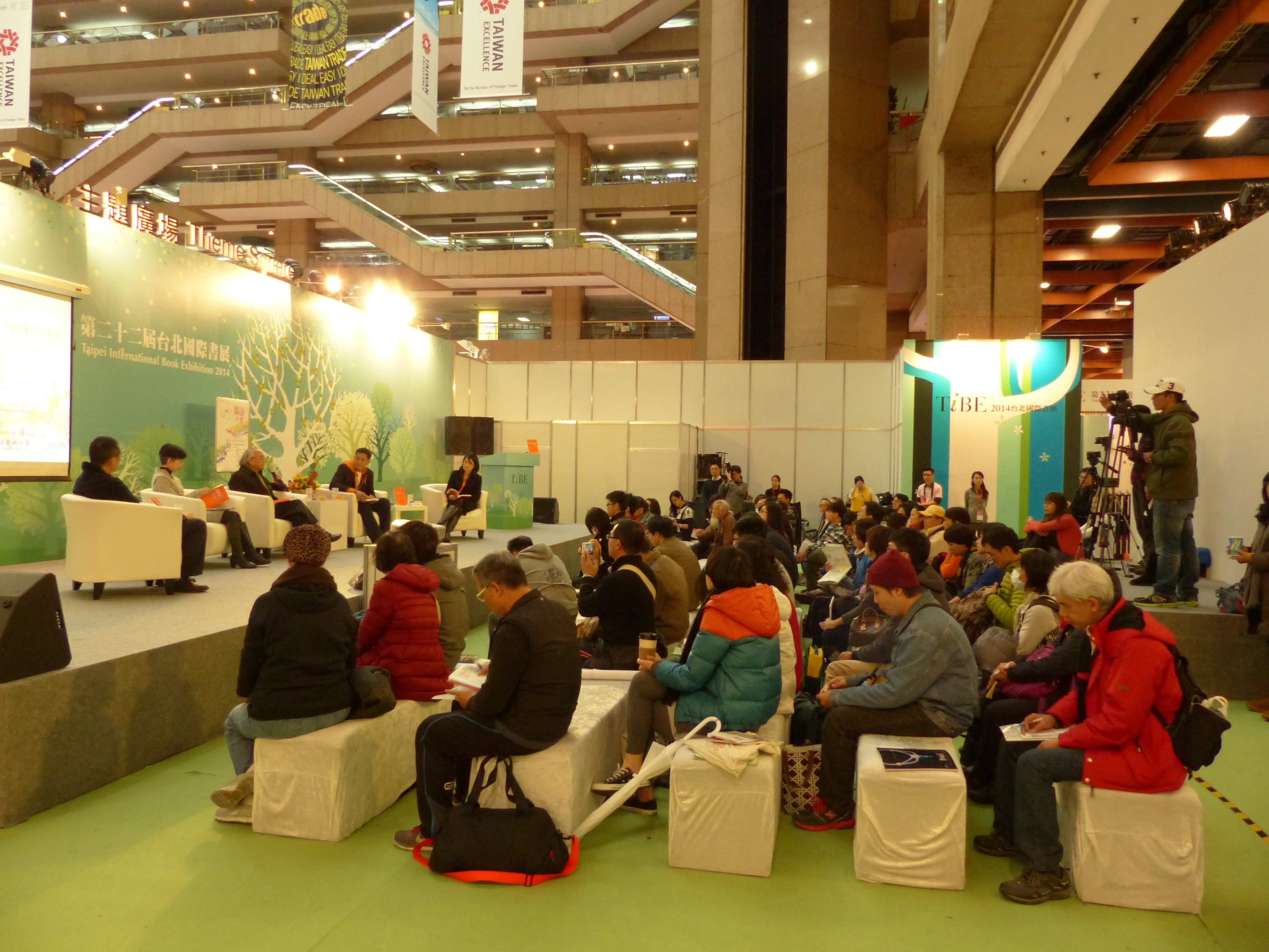 第22屆臺北國際書展，世貿一館主題廣場＜藝遊未盡＞新書座談會會場。